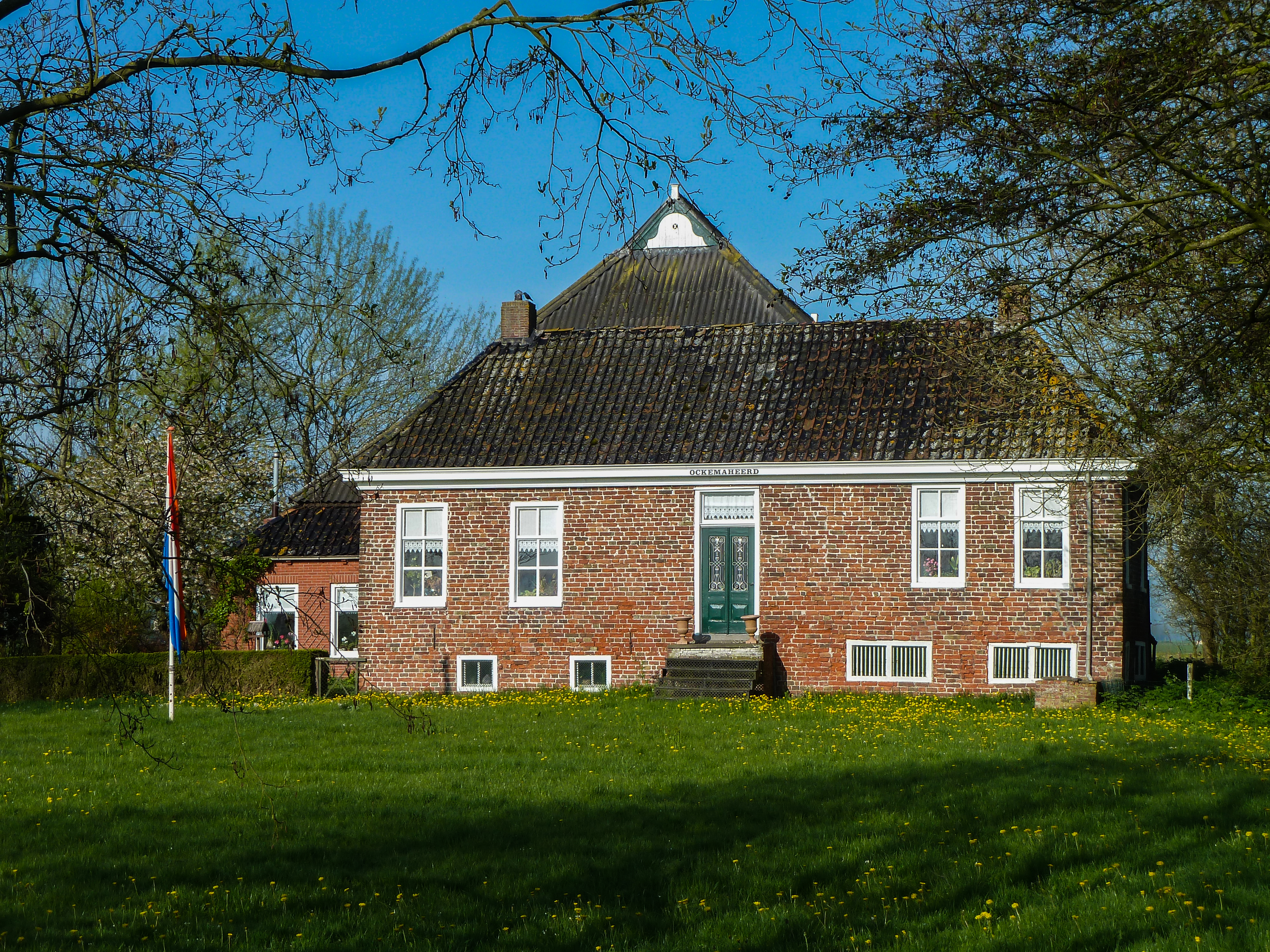 Boerderij Ockemaheerd ten zuidwesten van Stitswerd.